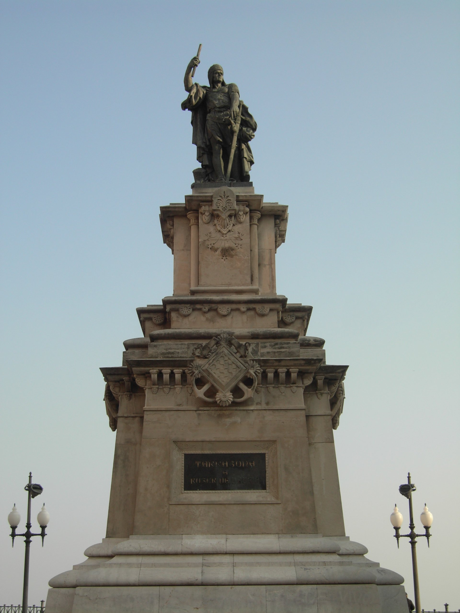 Roger of Lauria statue in Tarragona, Catalonia